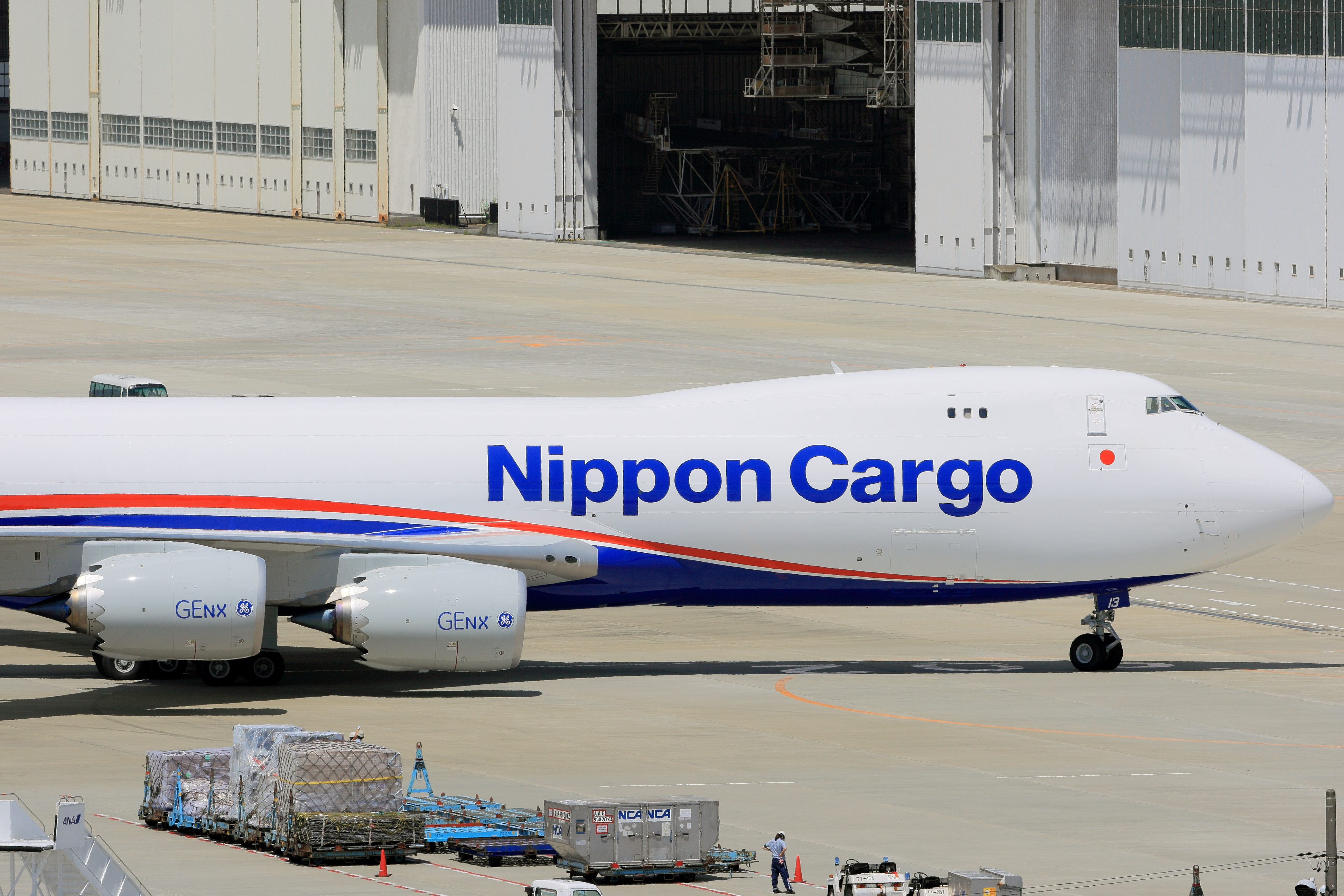 成田国際空港で撮影された、日本貨物航空のBoeing747-8F型機